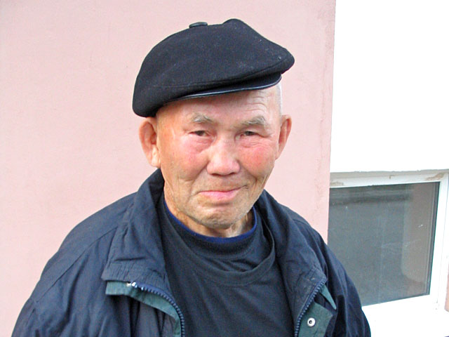 Ostyak (Khanty people) in Tomsk, Siberia, 2006. This man visits city first time scince 1960-s. RU: Остяк (хант) в Томске, 2006 год. Этот человек впервые оказался в городе с 1960-х годов.